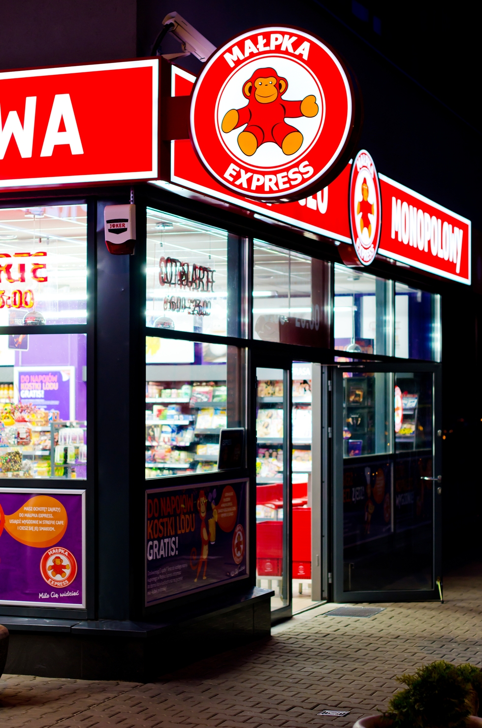 Sklep Małpka Express